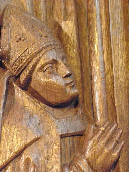 Représentation du Cardinal Louis II de Gorrevod (Stalles de la co-cathédrale N.D. de Bourg (01))